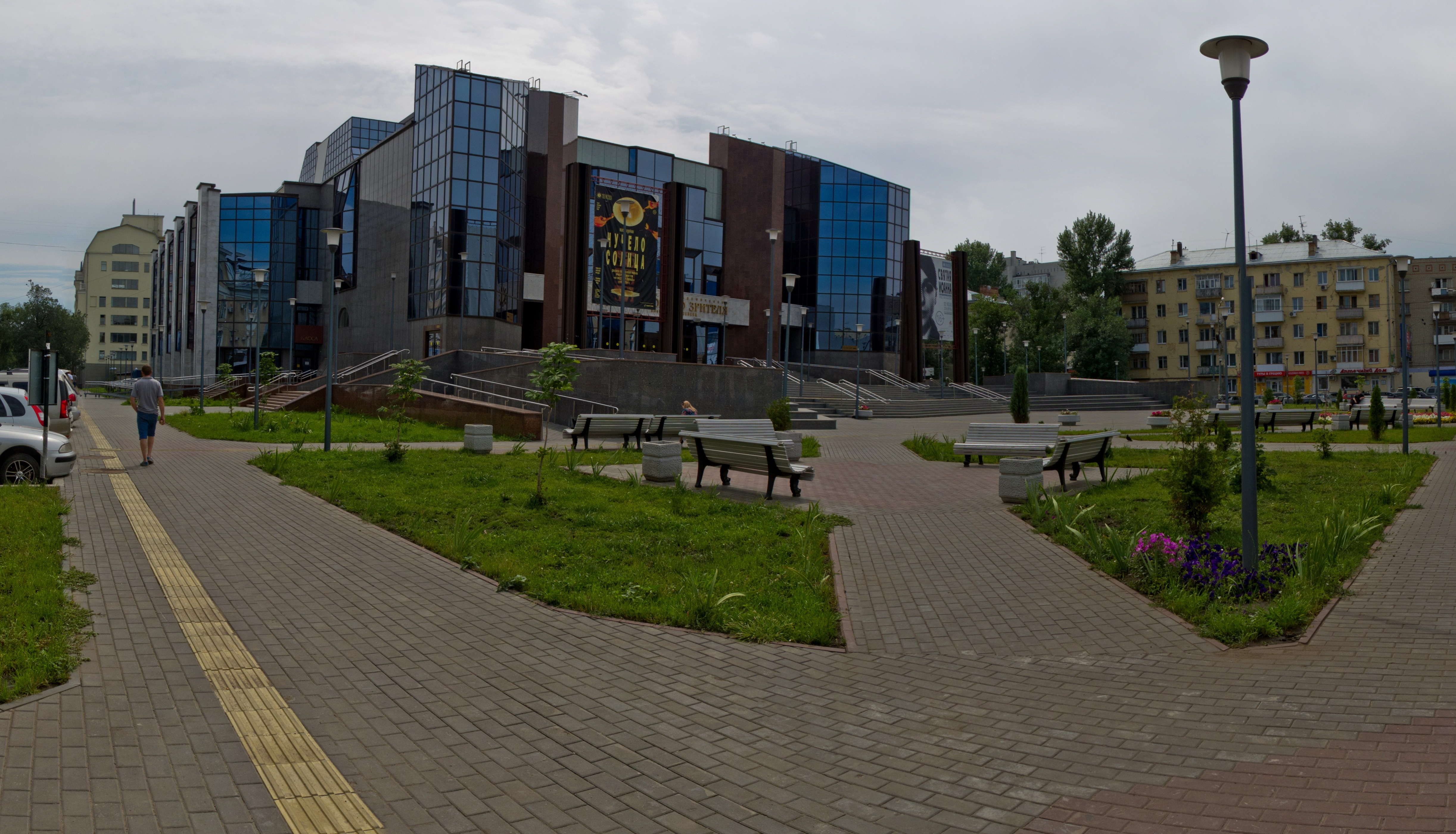 Новое здание ТЮЗа им. Киселева, Саратов, 2013